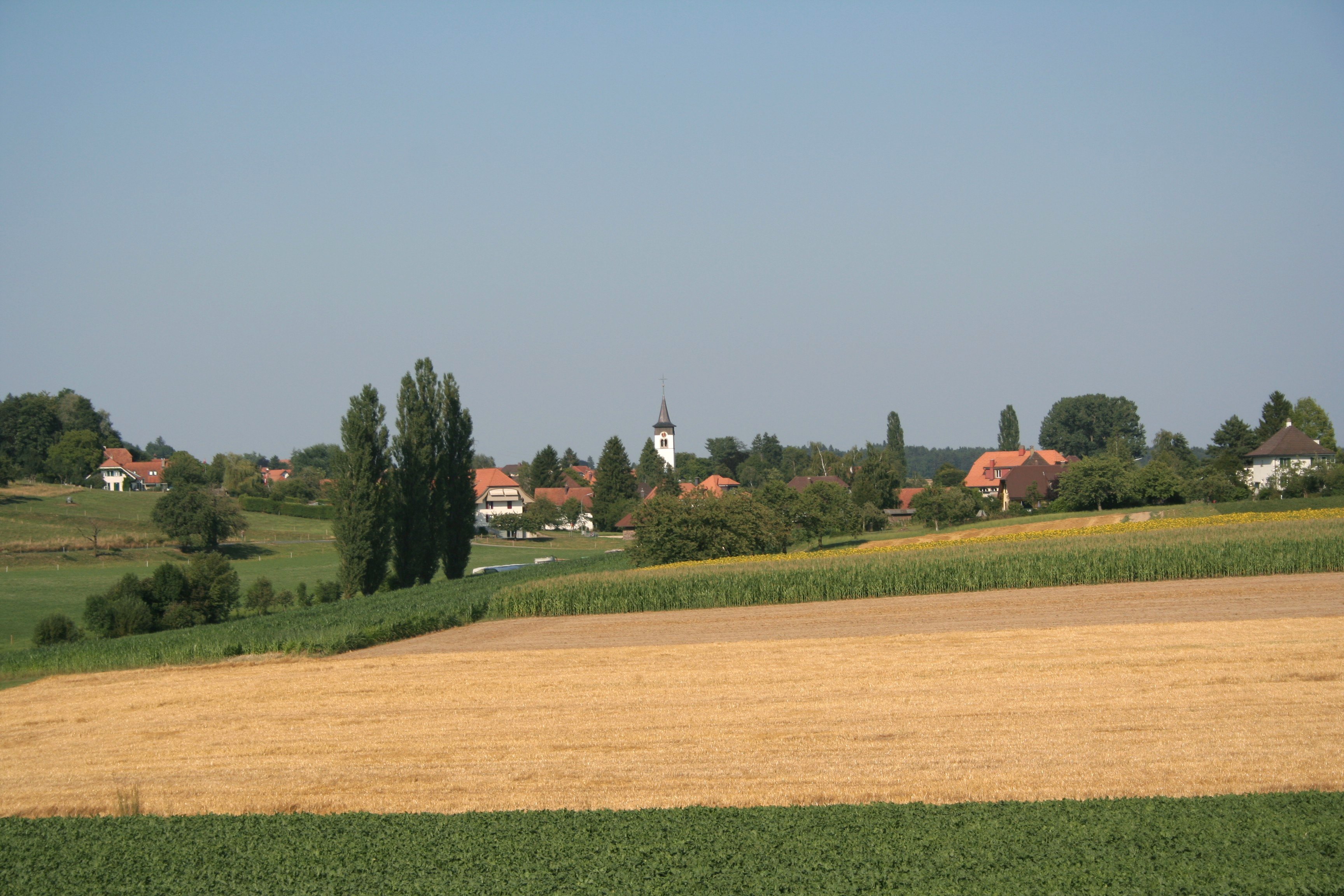 Wengi im Bezirk Büren, Schweiz